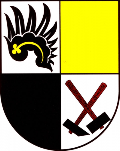 znak, Mastník, okres Třebíč